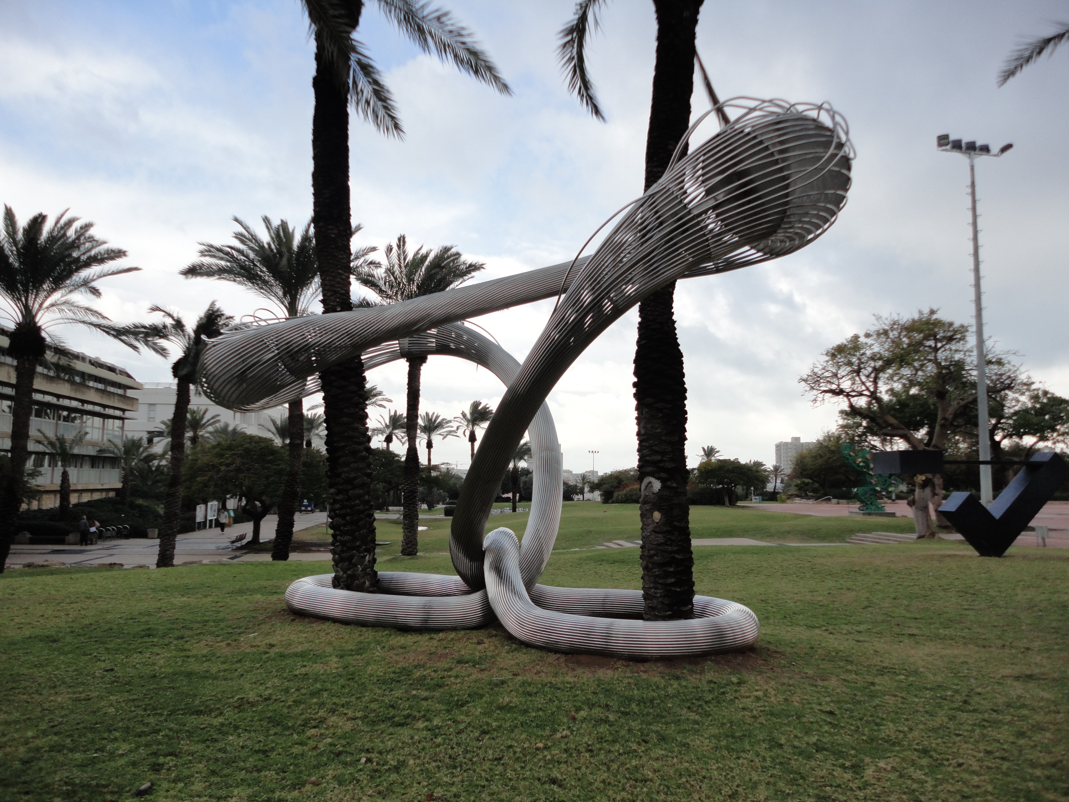 Sculpture